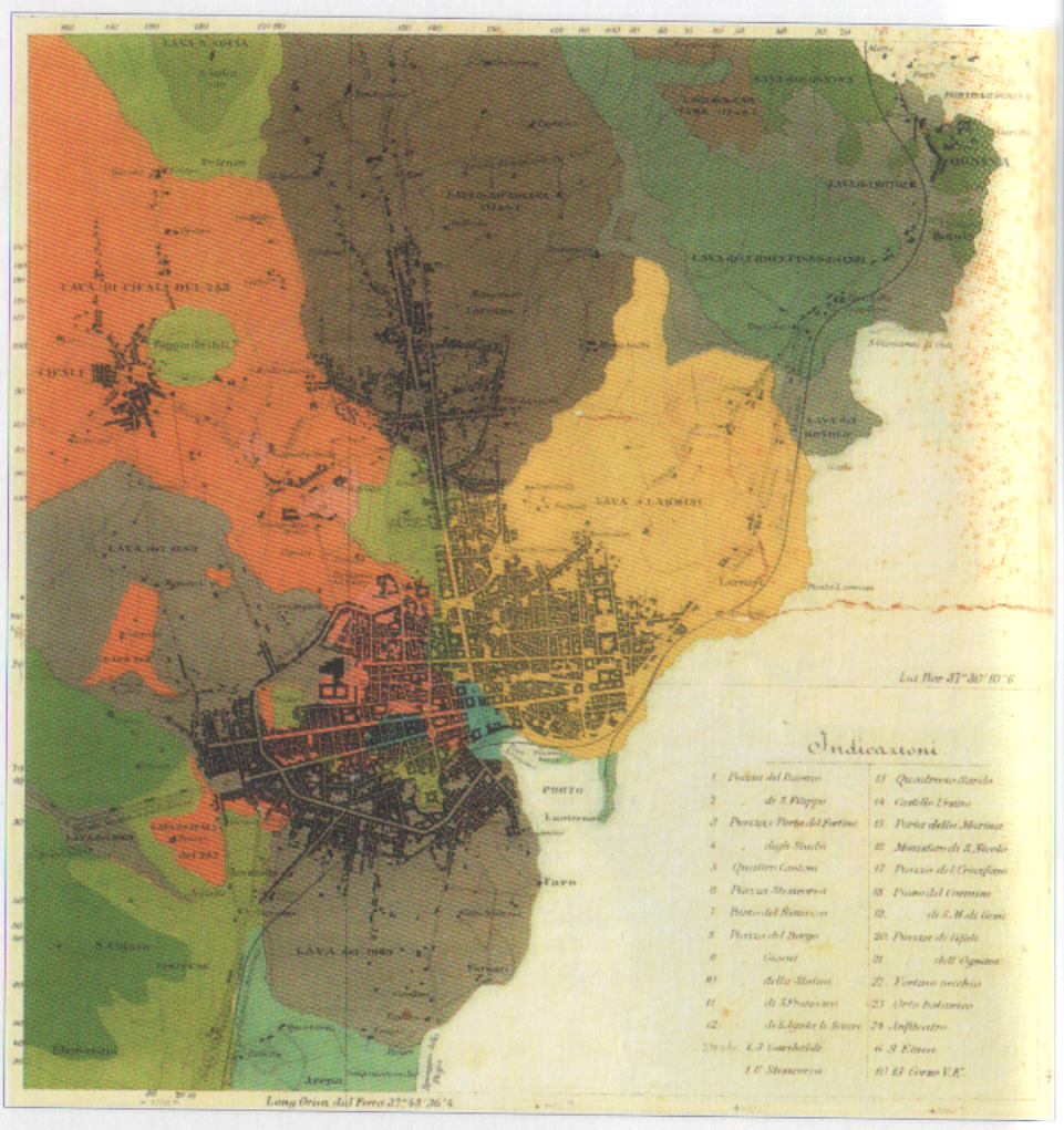 Sicilianu: La catta de' lavi catanisi pricidenti lu 1669: (Cammelo Sciutu Patti, Catta giuloggìca ri Catania, Catania 1873). Si vidunu li principali sciare ca' cupreru la civitati nfinu allu 1669.